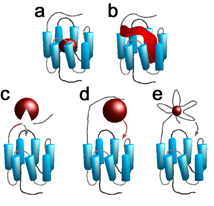 erstellt am: 15.05.04 erstellt von: Sven Jähnichen (Original text: Mechanismus der Ligandbindung an G-Protein-gekoppelte Rezeptoren. a) Bindung von Aminen, Nucleotiden und Lipiden. b) Bindung kleiner Neuropeptide. c) Bindung von Proteinasen an Proteinase-aktivierte Rezeptoren. d) Bindung von größeren Peptidhormonen. e) Bindung kleiner polarer Transmitter.)